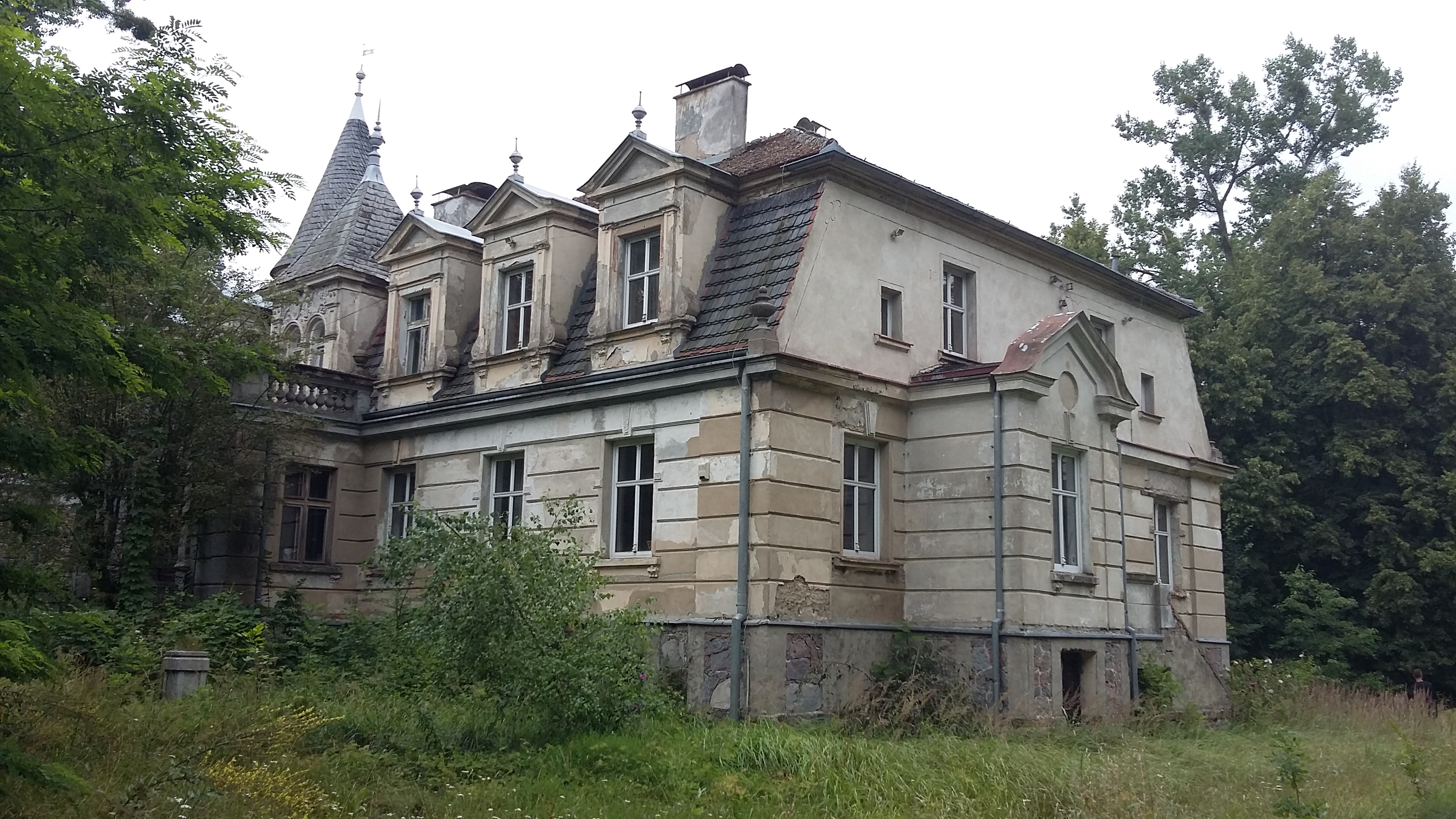 Buszewo, pałac, kon. XIX, 1900, 1910